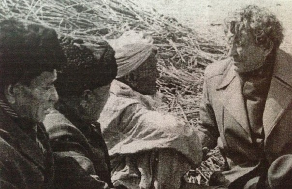 1975 жылы Ботахан ауылында халық ақыны Әбу Сәрсенбаев пен Сибағат Мәкәрiмұлы арасында қоғамдық, әлеуметтiк, рухани сұрақтарды қамтыған сұхбат.